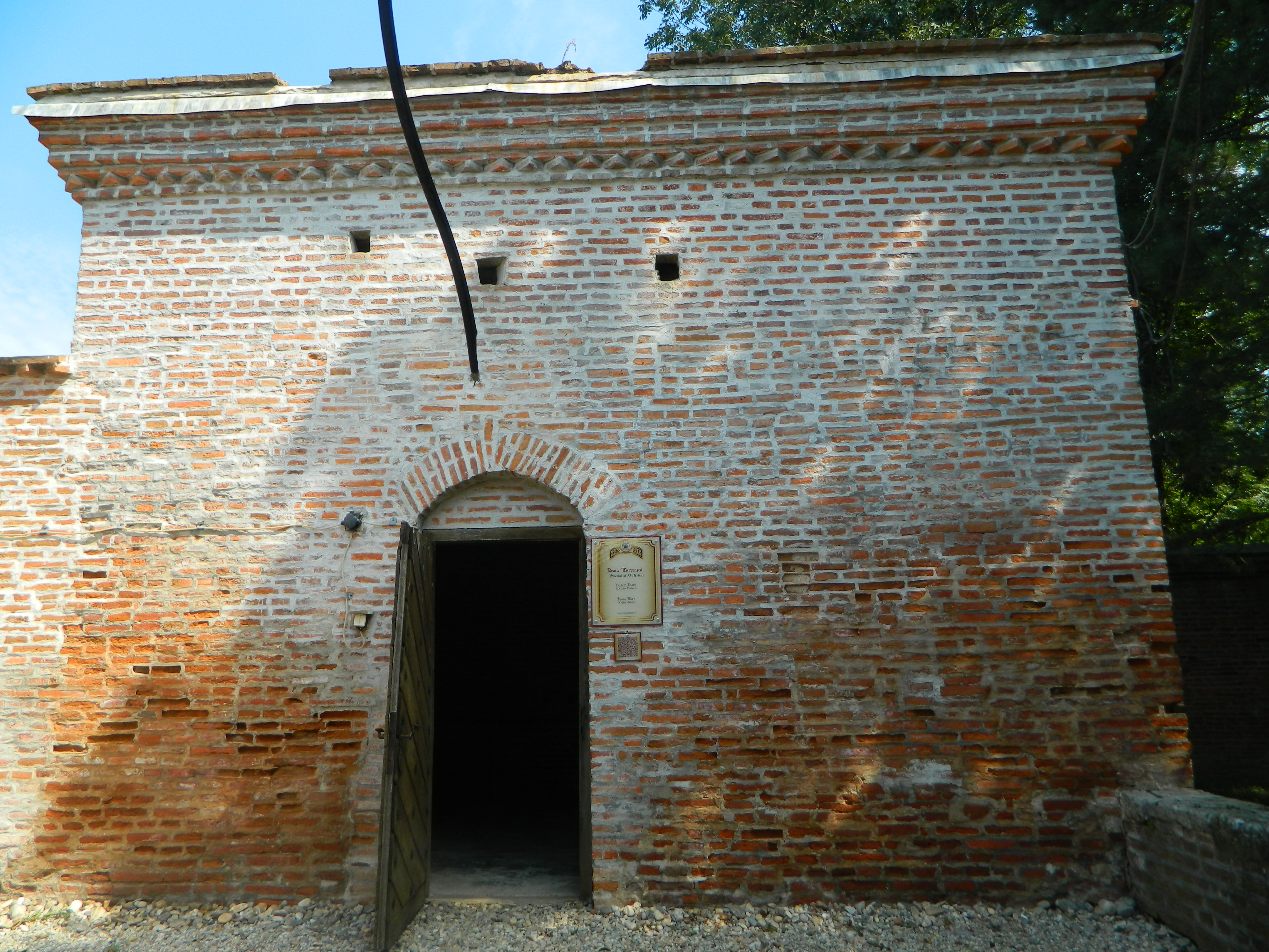 Baia turcească 02